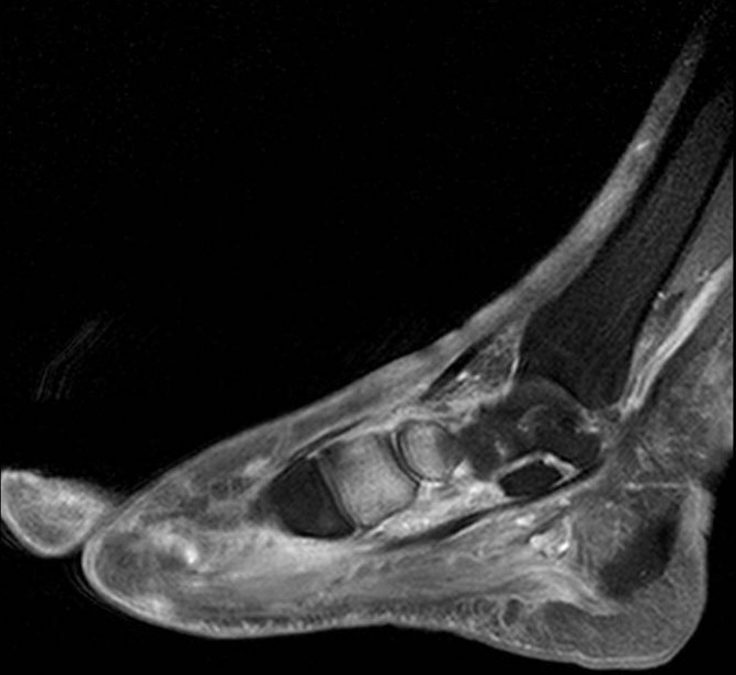 Geschwollener, schmerzunempfindlicher rechter Fuß ohne Hautverletzung bzw. Infektion bei Diabetes mellitus, zugehöriges Magnetresonanztomogramm (hell: Knochenmarködem im Bereich der Fußwurzelknochen)